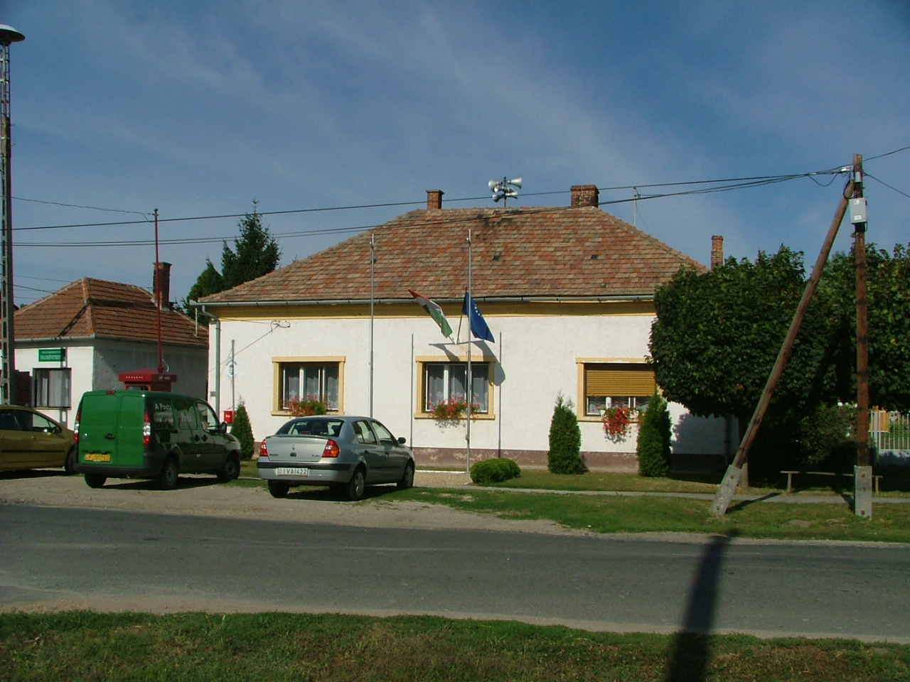 Magyarkeresztúri községháza